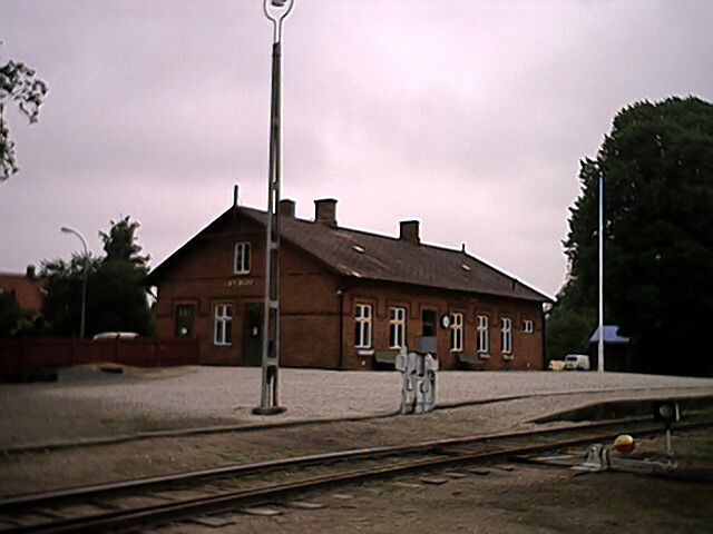 Stationshuset i Sankt Olof. Photo: User:Väsk